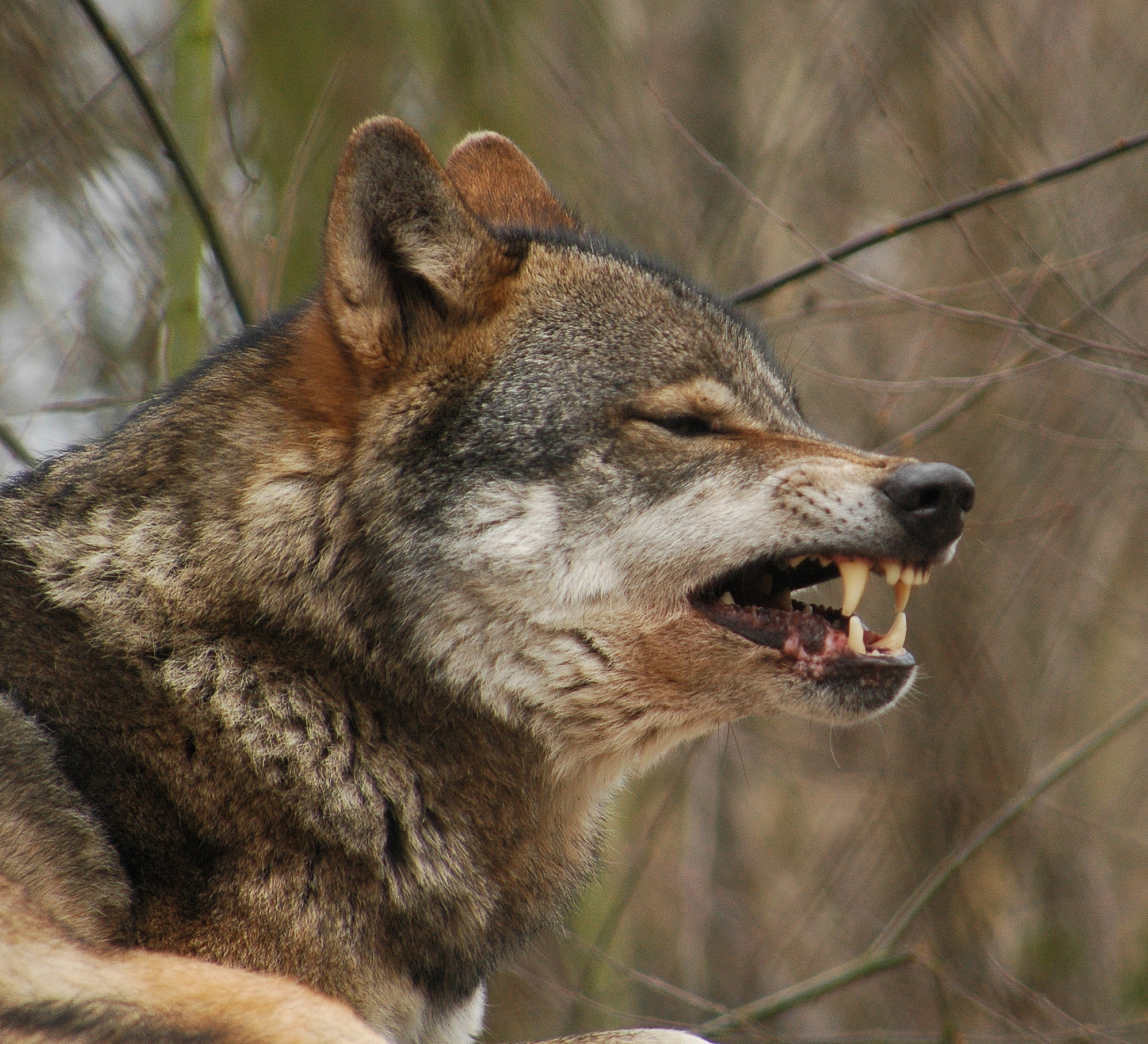 A yawning Grey Wolf.